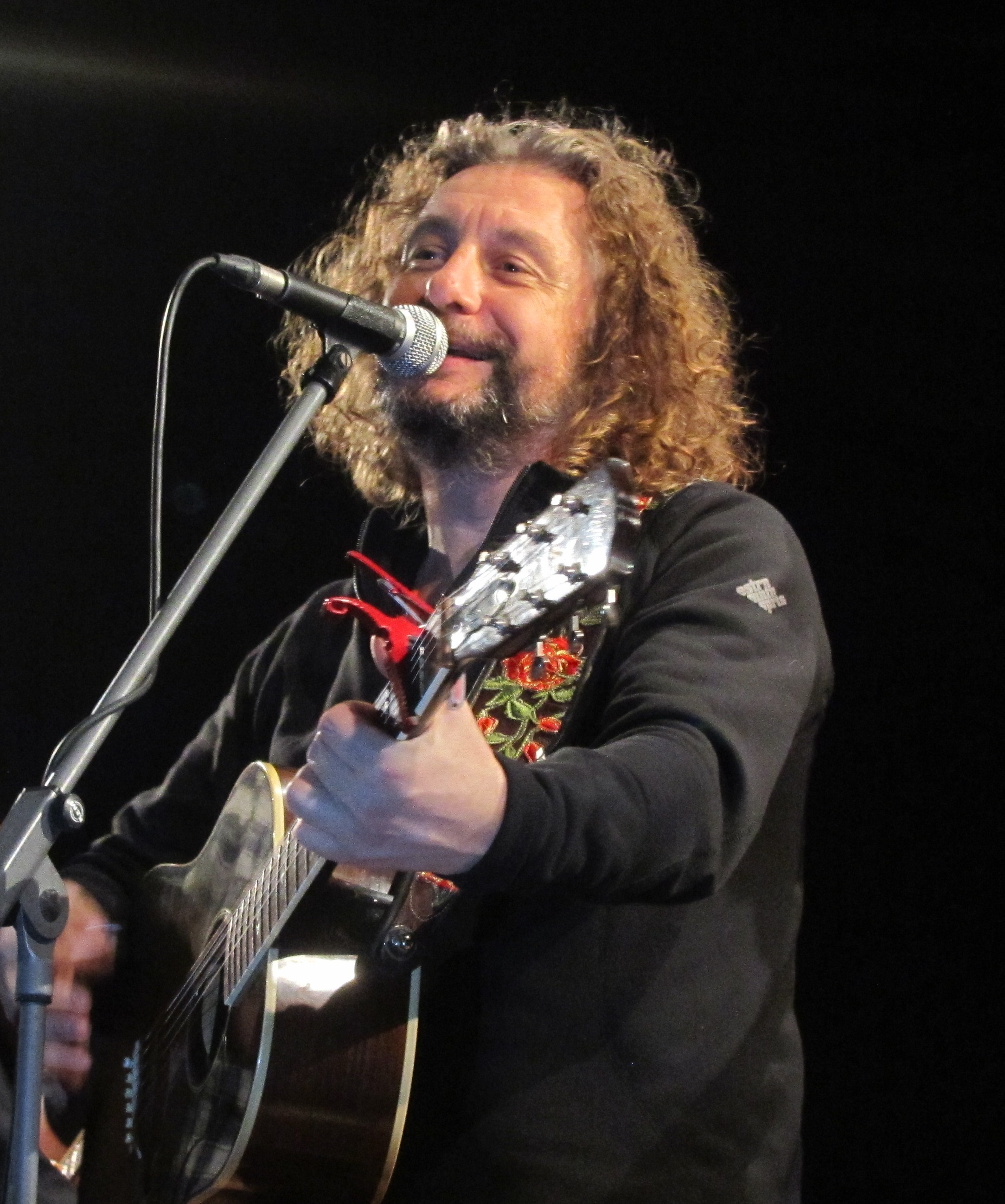 James Maddock a Light of Day 2012 - Figino Serenza